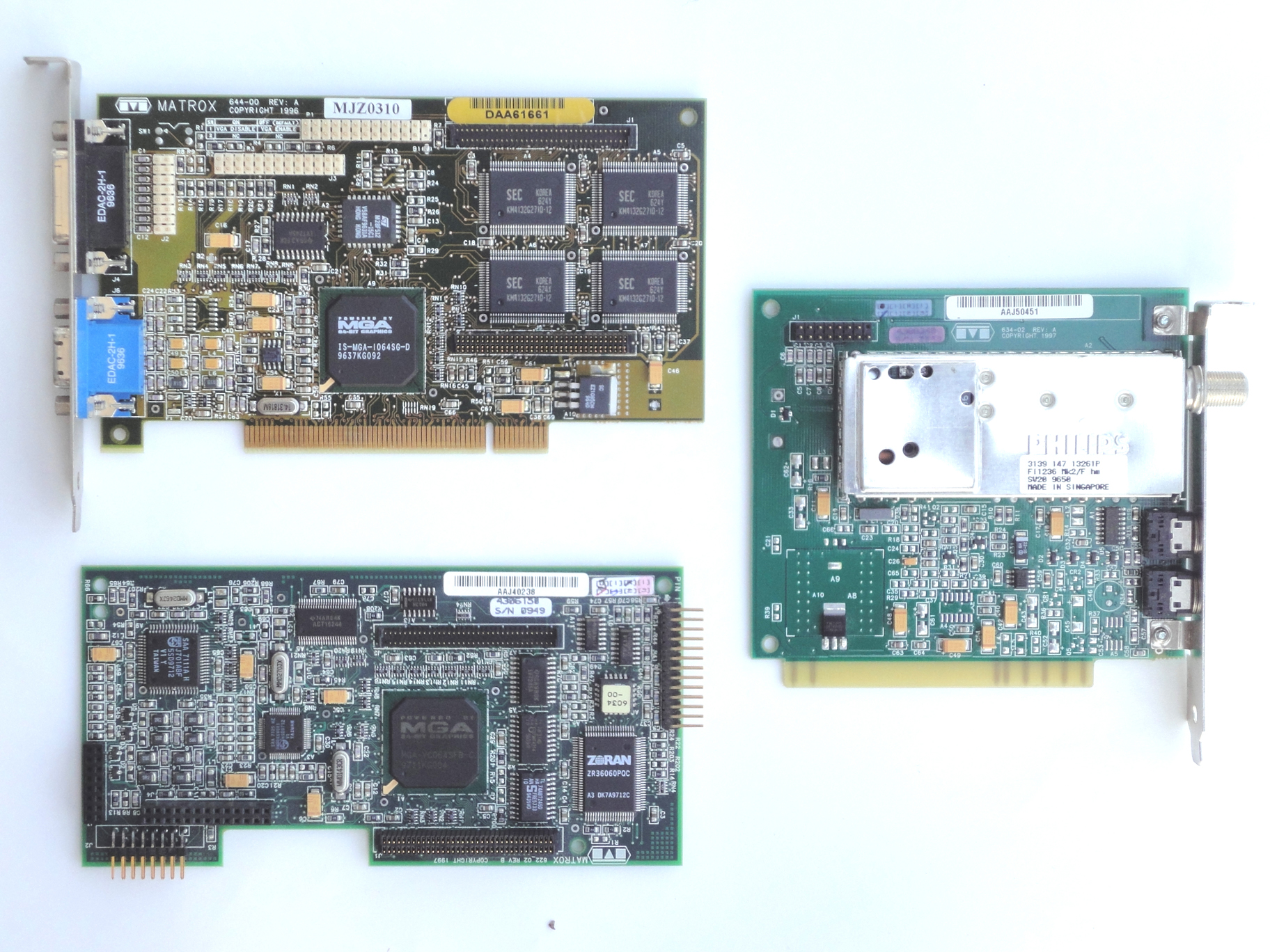 Matrox Mystique and Rainbow Runner